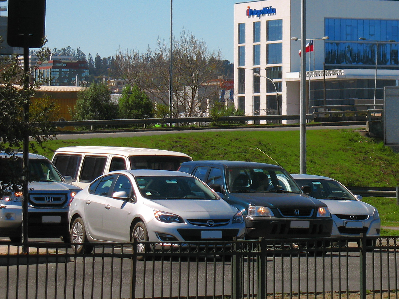 Opel Astra 1.6T Enjoy Sedan 2013